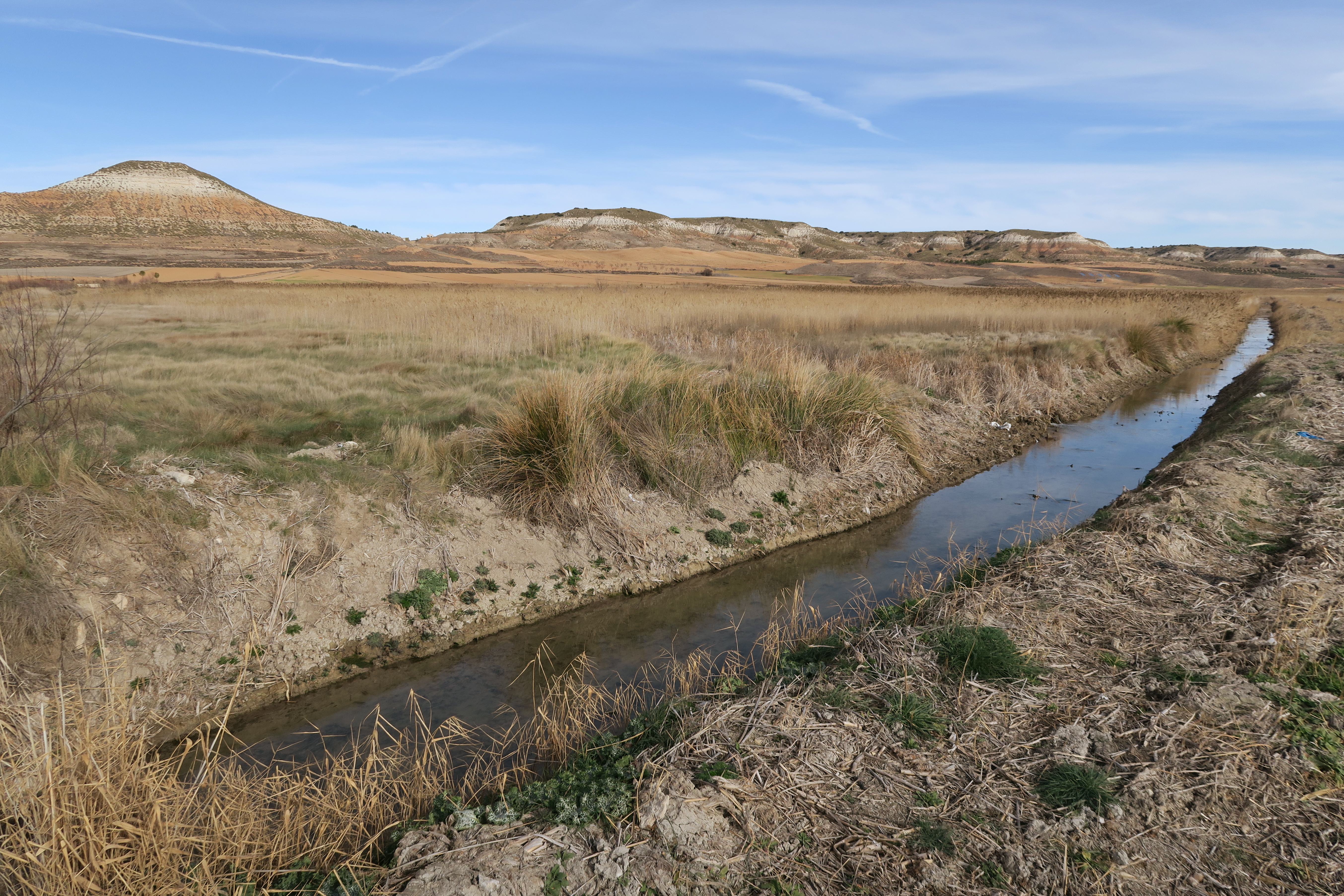 Arroyo Cedrón a su paso por La Guardia, Toledo